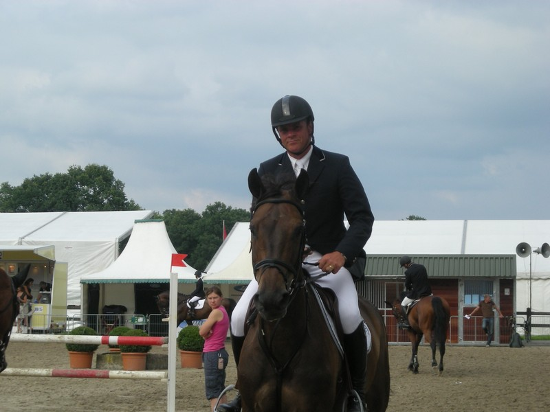 Jeroen Dubbeldam op het CSI in Geesteren